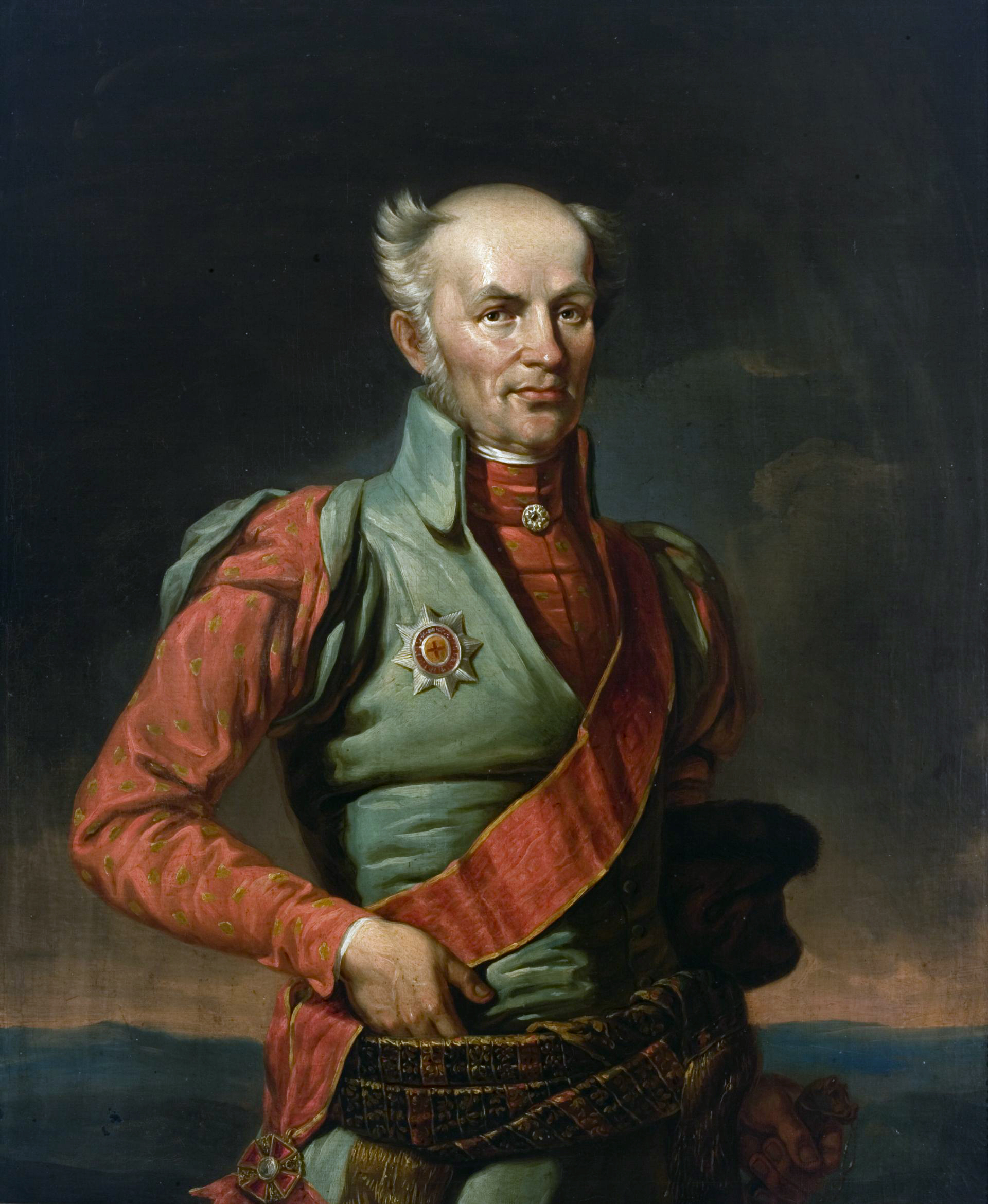 Беларуская (тарашкевіца): Партрэт Войцеха Пуслоўскага (Vojciech Pusłoŭski)